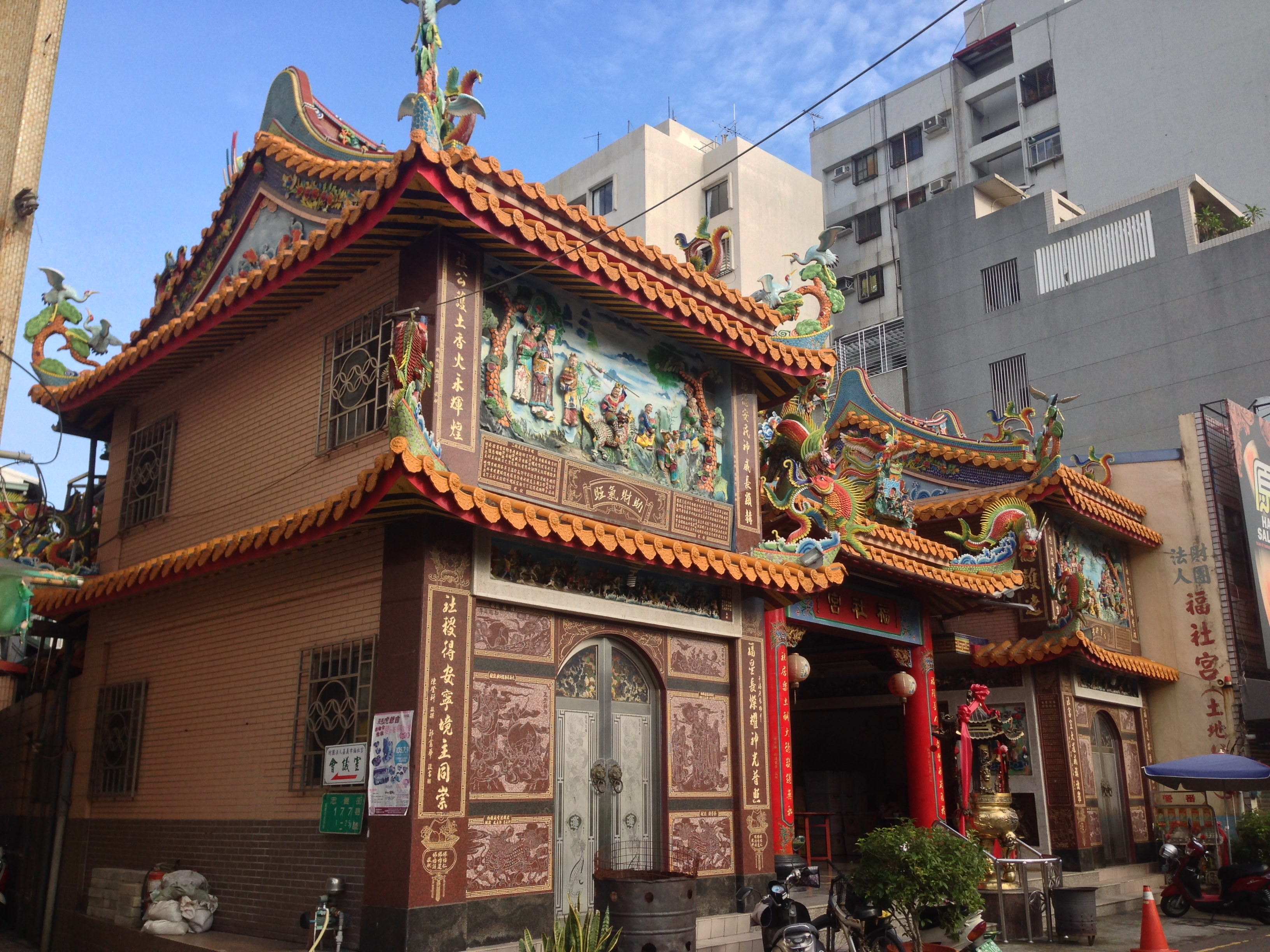 中文（台灣）: 福社宮斜照